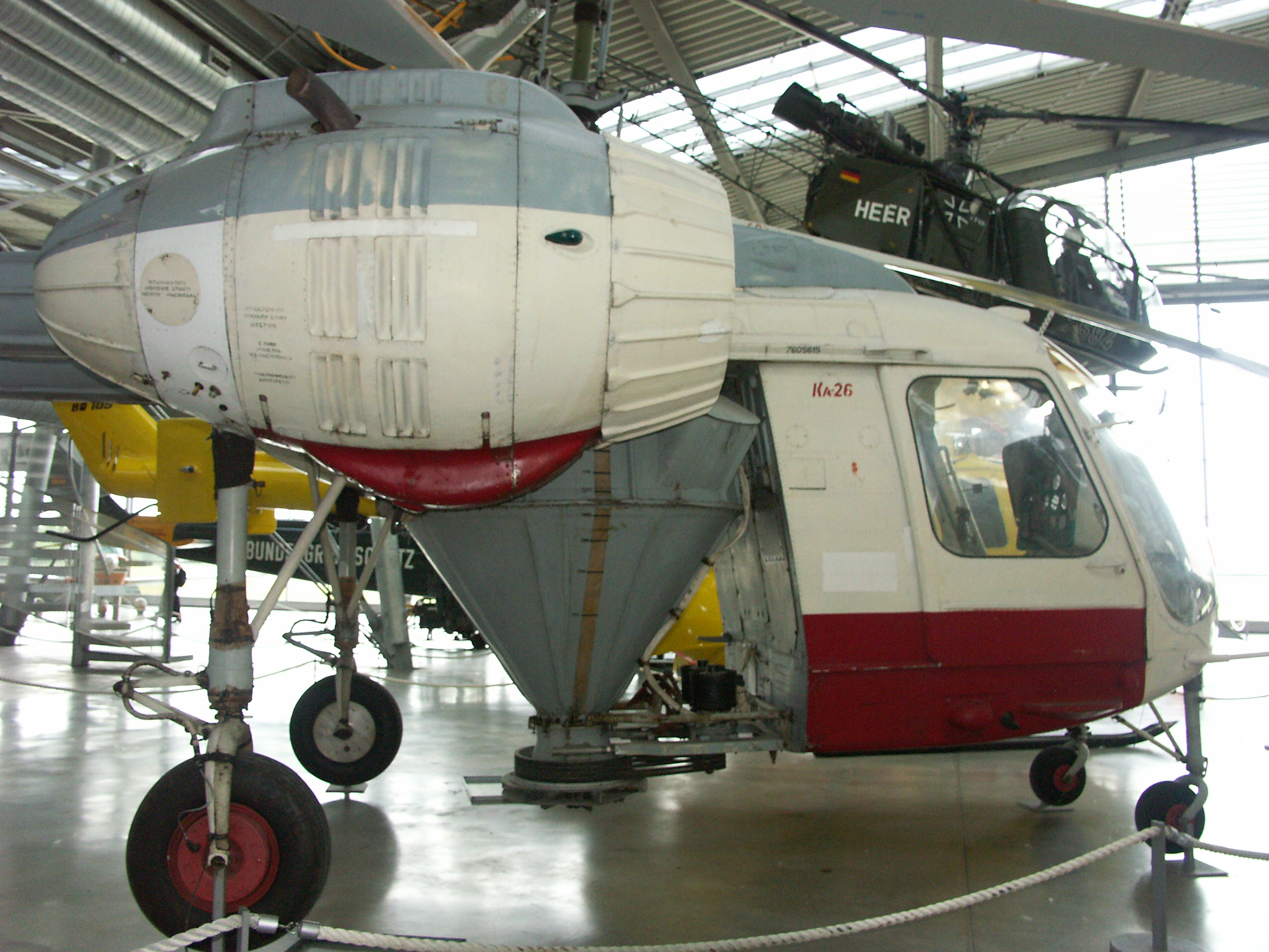 Deutsches Museum Munich Photo: Jean-Patrick Donzey